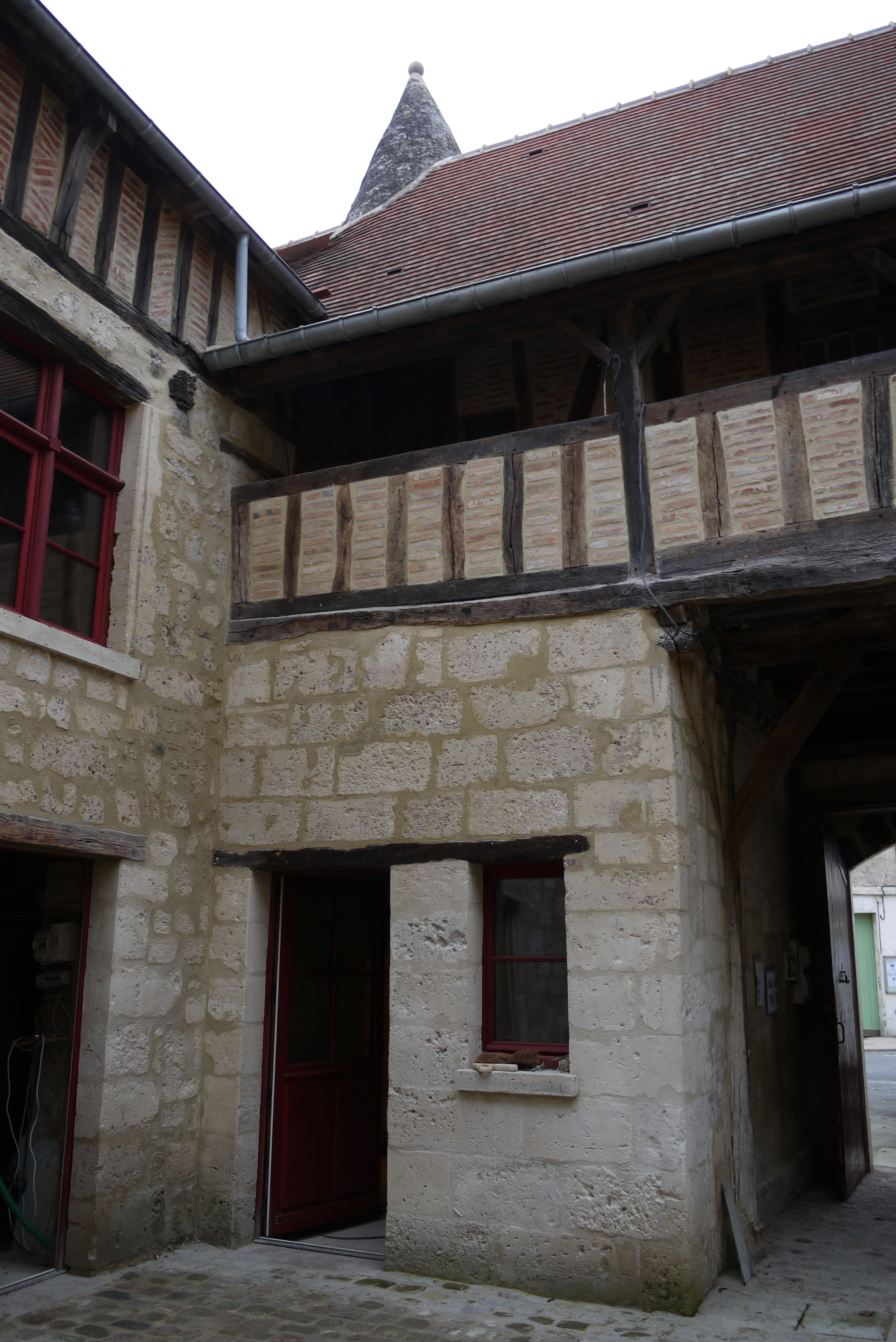 La cour intérieure de la maison à colombages